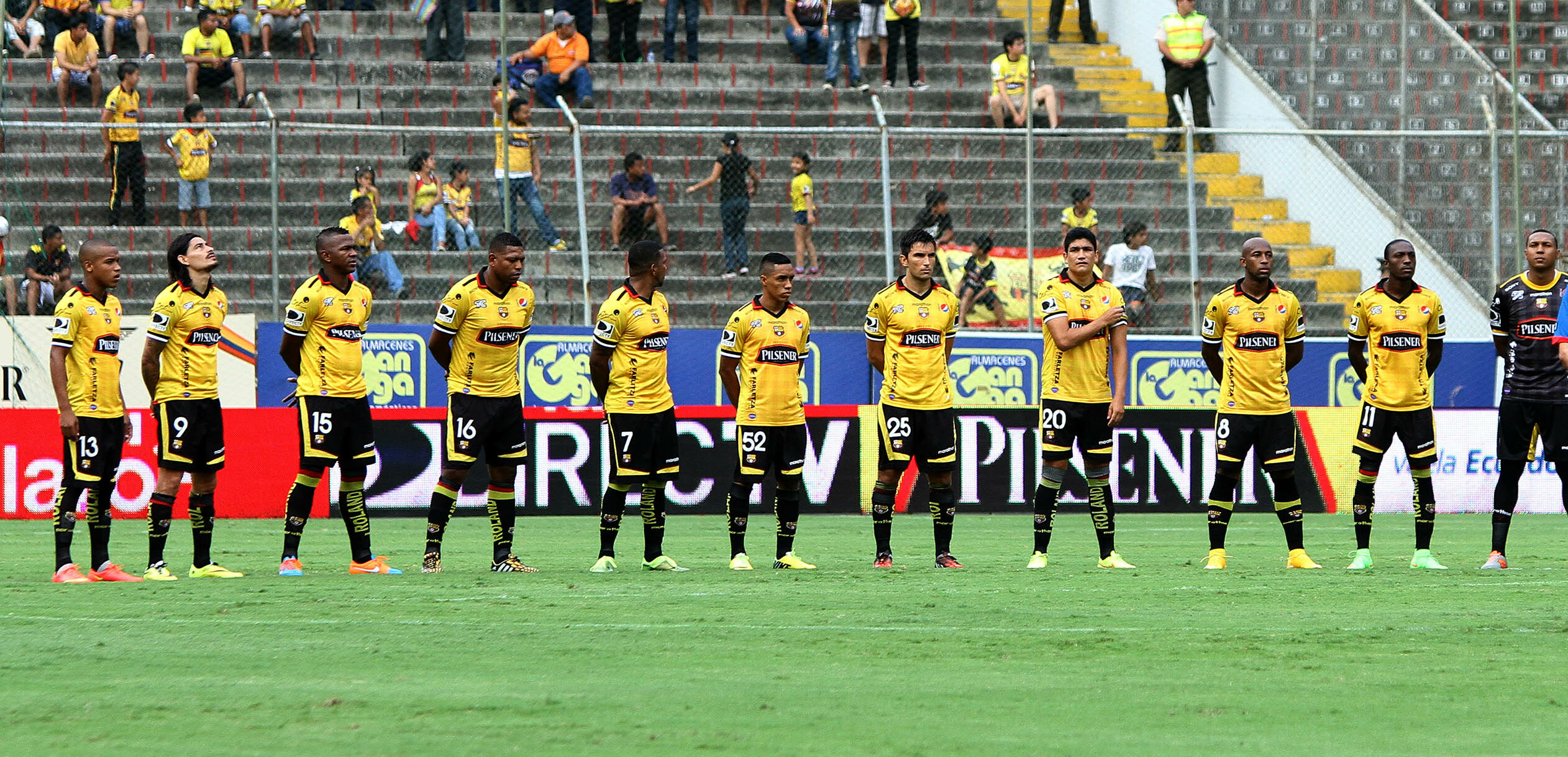 Guayaquil, Ecuador, 30 de noviembre del 2014 (Andes).- Un minuto de silencio se rindio como homenaje al fallecido comediante Roberto Gómez Bolaños previo al partido entre Barcelona frente a Deportivo Quito en el estadio Monumental Foto: César Muñoz/Andes